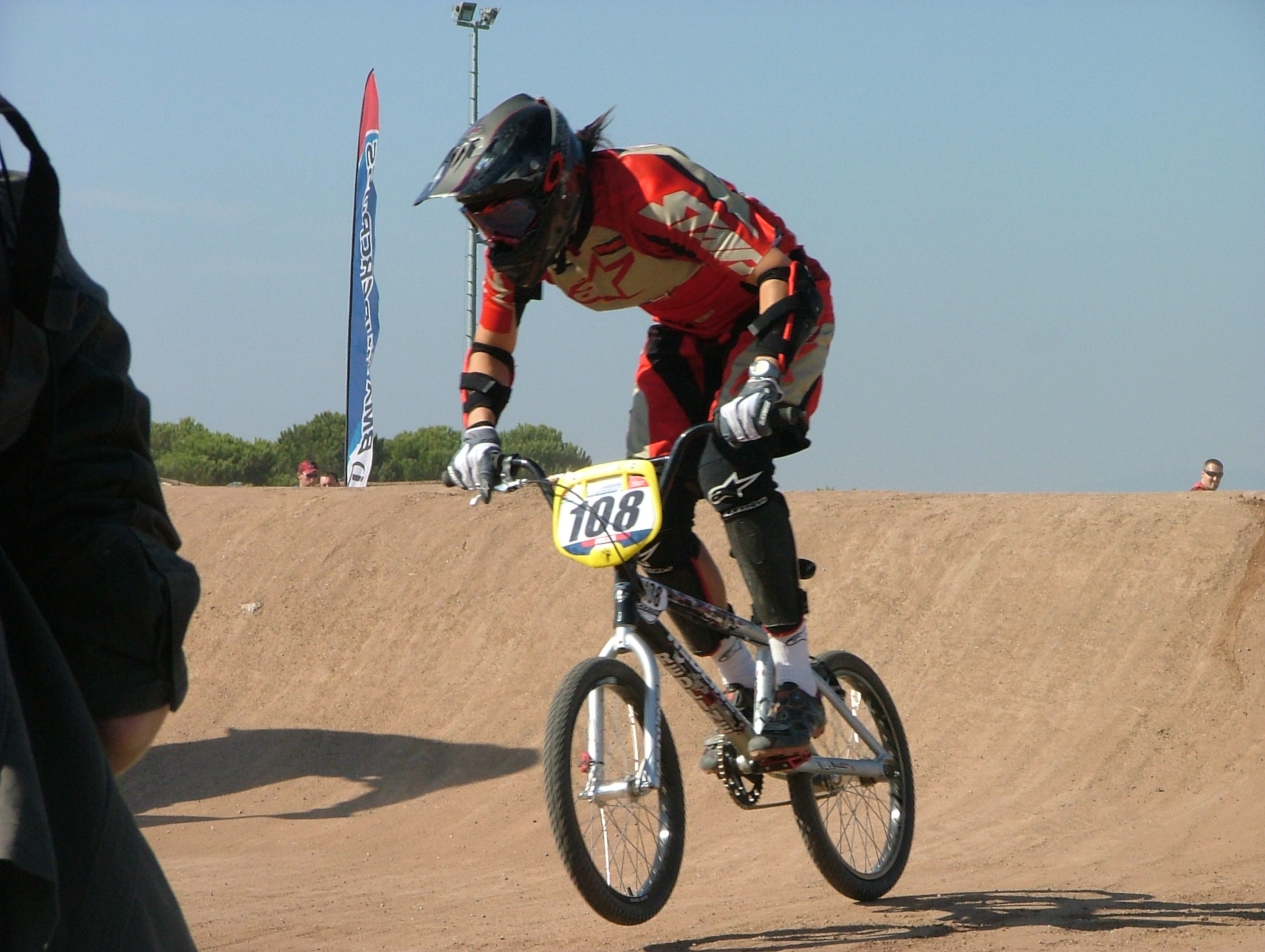 108 Anneke Beerten (Olanda)